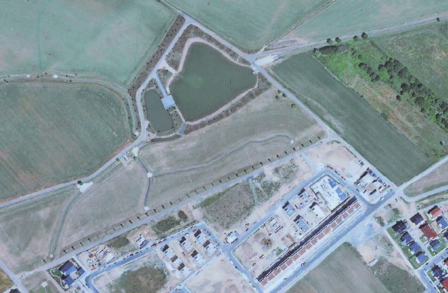 Der Kätcheslachpark ist eine Grünanlage im Stadtteil Kalbach-Riedberg der Stadt Frankfurt am Main. Der Park mit zentralem Teich, Regenwasser-Rückhaltebecken sowie mehreren Zu- und Ablaufgräben wurde von 2006 bis 2007 in einer Mulde der Anhöhe Riedberg angelegt. Sein Hauptzweck ist die Gewässerregulierung der benachbarten, zur selben Zeit neu angelegten Wohnsiedlung. Das gezeigte Luftbild des Parks aus dem Jahr 2006 ist ein Ausschnitt aus einer der vor Ort dauerhaft angebrachten Informationstafeln des Lehr-Wanderweges GEO-Pfad. Der Urheber des Luftbildes wird auf der Tafel nicht eindeutig benannt. Rechtliche Grundlage dieser Veröffentlichung und für die Weiternutzung der Datei: Panoramafreiheit, § 59 UrhG der Bundesrepublik Deutschland: Bleibend an öffentlichen Wegen befindliche, urheberrechtlich geschützte Werke.